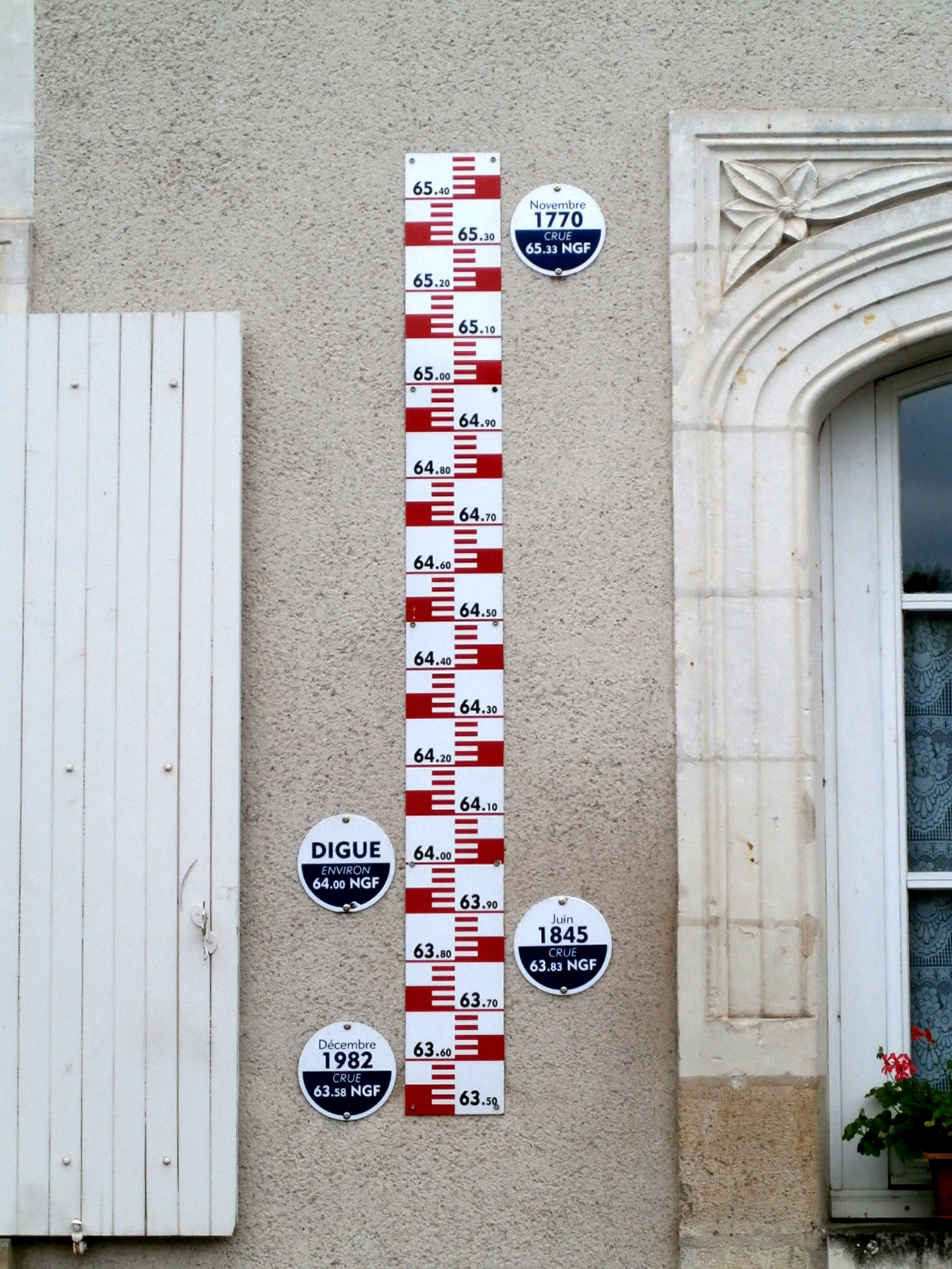 témoin de crue à Reignac-sur-Indre